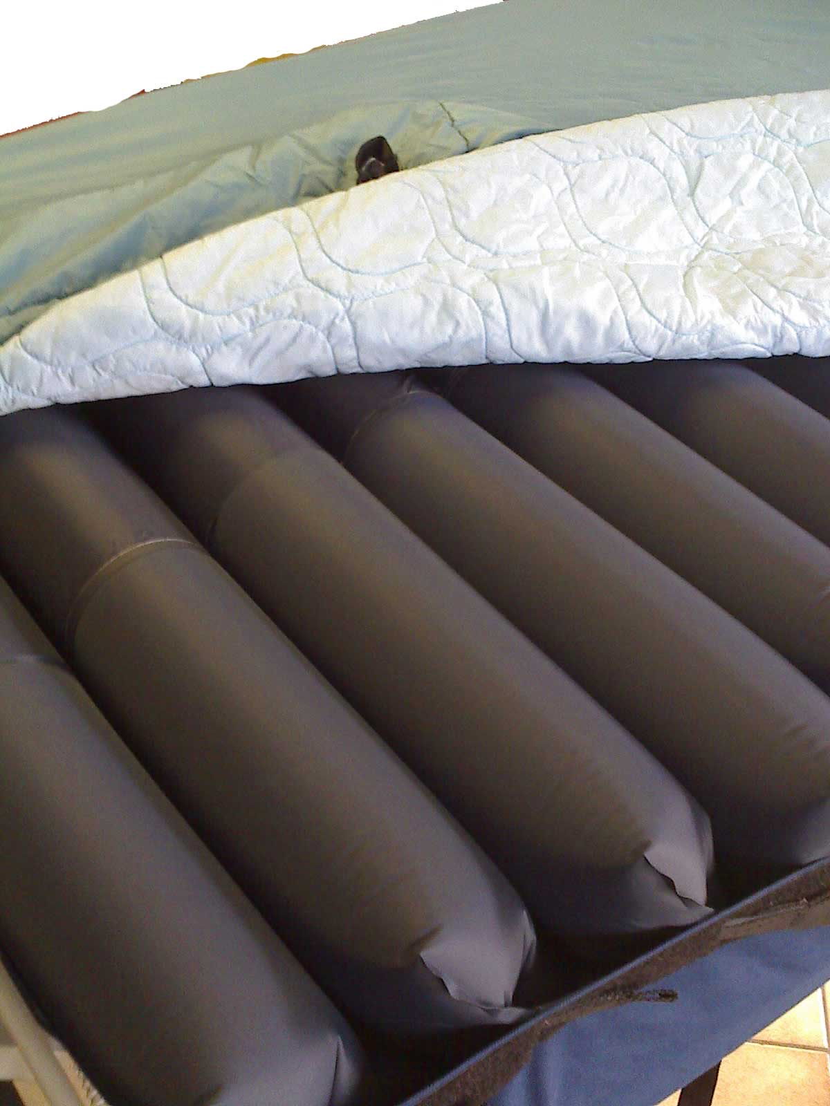 Luftkissensystem